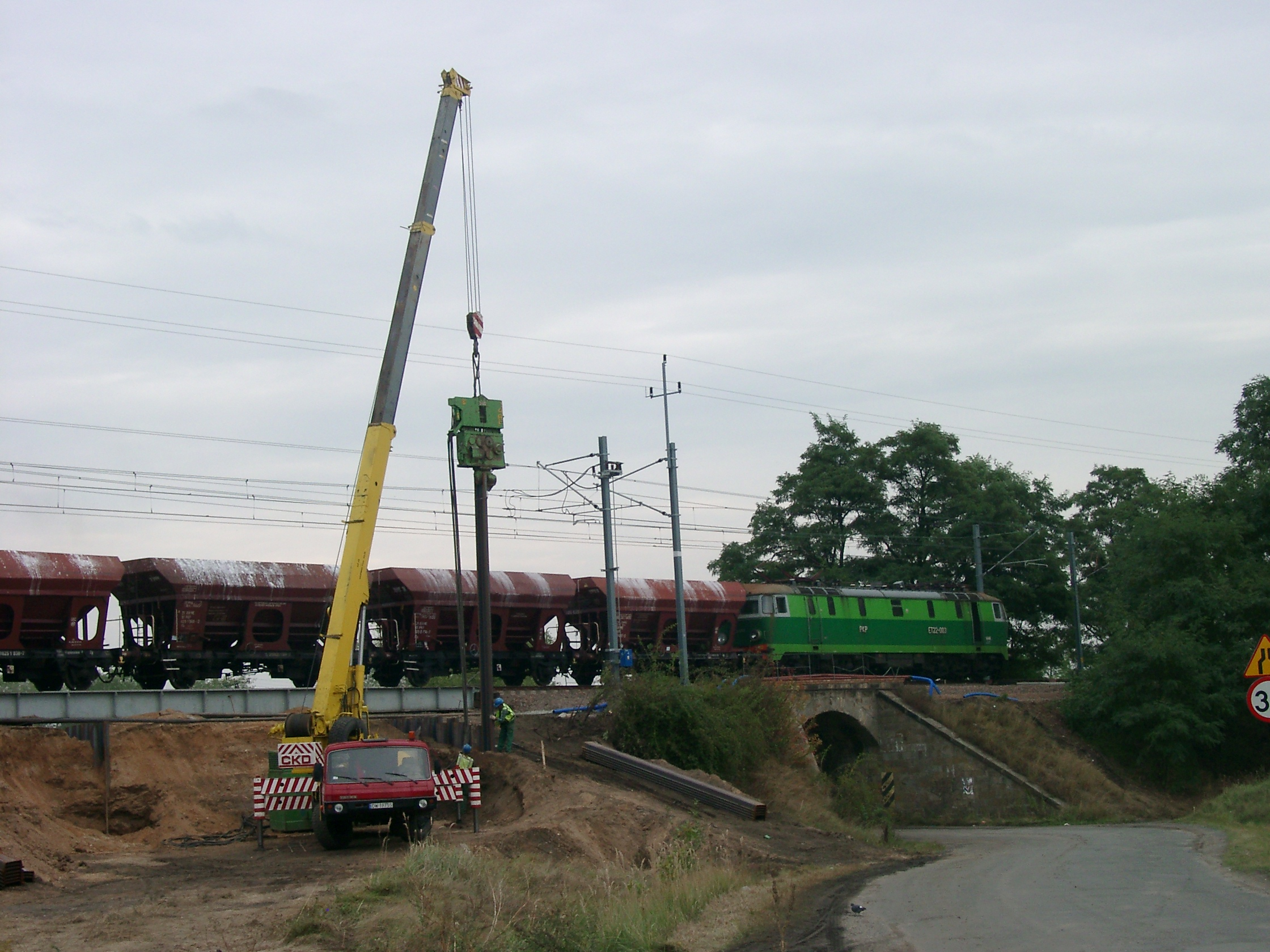 Modernizacja torów kolejowych w Chojnowie (Polska) Railway tracks modernization in Chojnów, Poland.